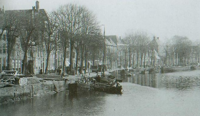 Thorbeckegracht